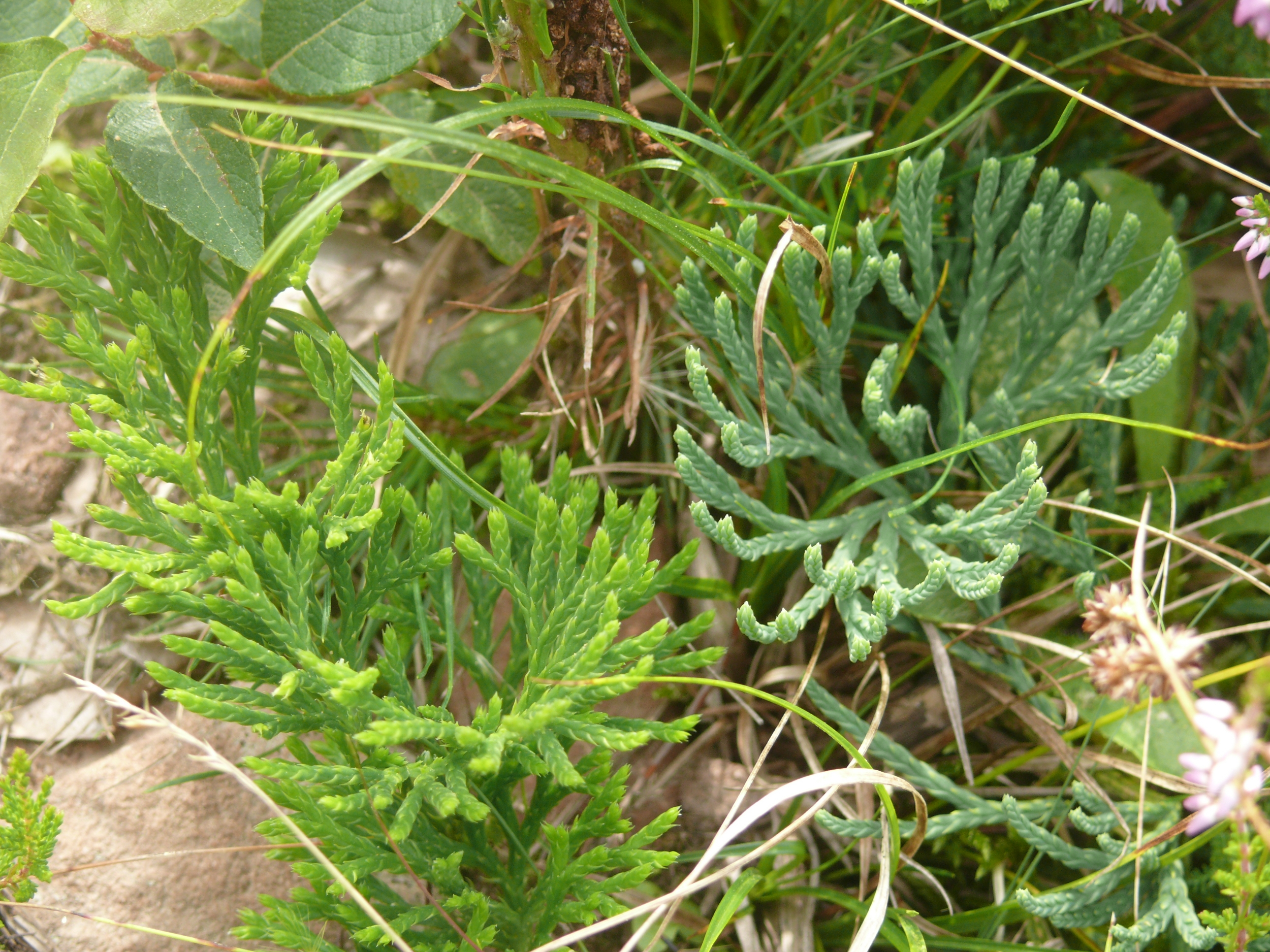 Diphasiastrum zeilleri und Diphasiastrum tristachyum, Odenwald